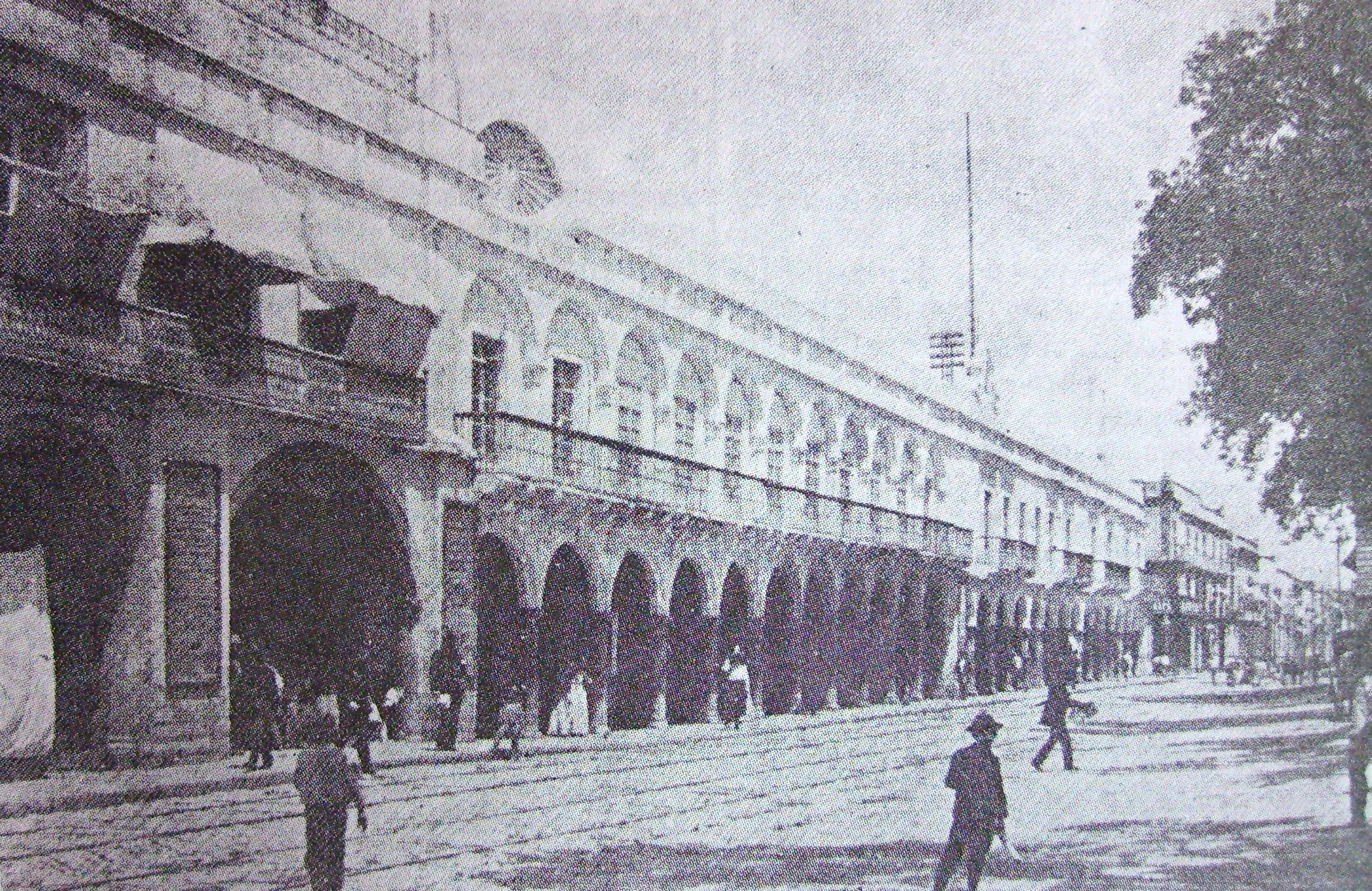 El antiguo Palacio Municipal de Puebla, construido en 1771 que subsistió hasta 1897, cuando se iniciaron las obras del actual palacio.